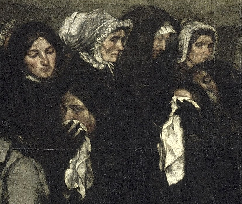 Gustave Courbet (français, 1819-1877): Un Enterrement à Ornans (1850), détail, Paris, Musée d'Orsay. Le réalisme s'exprime à travers l'image triviale de femmes pleurant dans un mouchoir des plus commun.